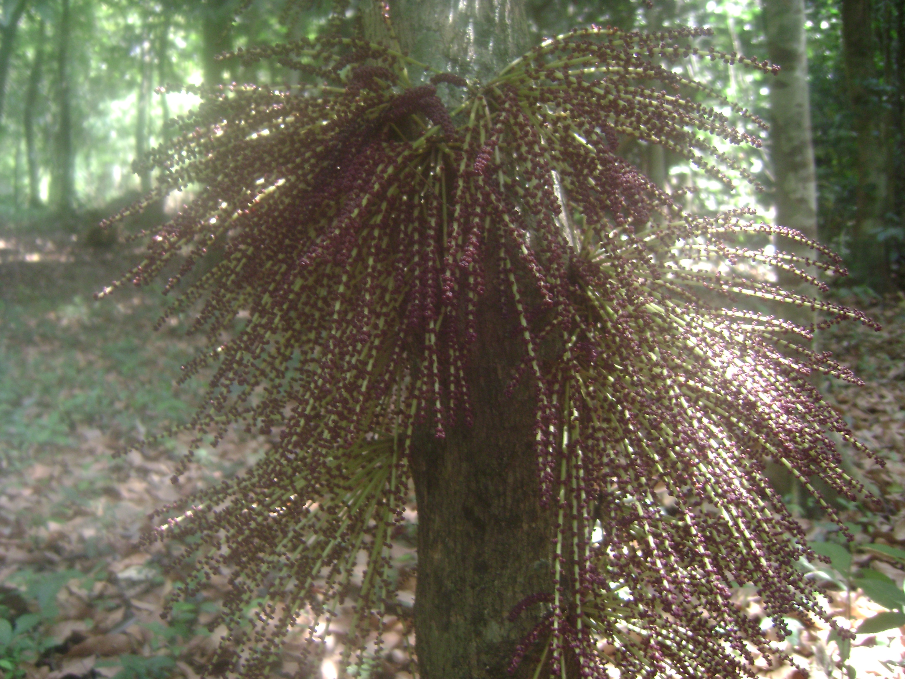 കാട്ടില് കാണുന്ന ഒരു ചെടി. ആറളം വന്യജീവി സംരക്ഷണ കേന്ദ്രത്തില്‍ നിന്ന്